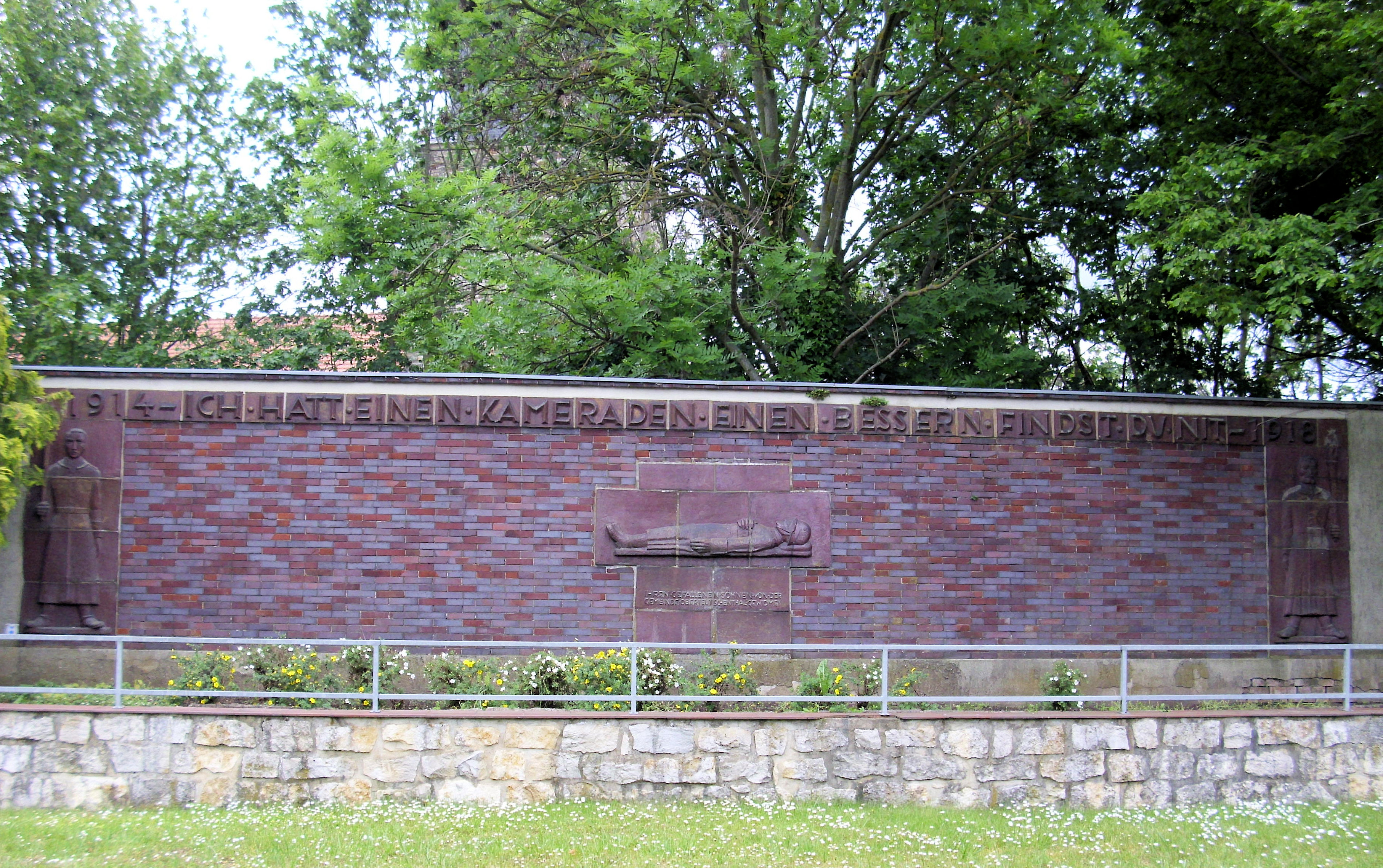 Kriegerdenkmal für die im Ersten Weltkrieg Gefallenen aus Oberteutschenthal, Terrakottareliefs mit Inschrift: Ihren gefallenen Söhnen von der Gemeinde Oberteutschenthal gewidmet, eingeweiht 1932